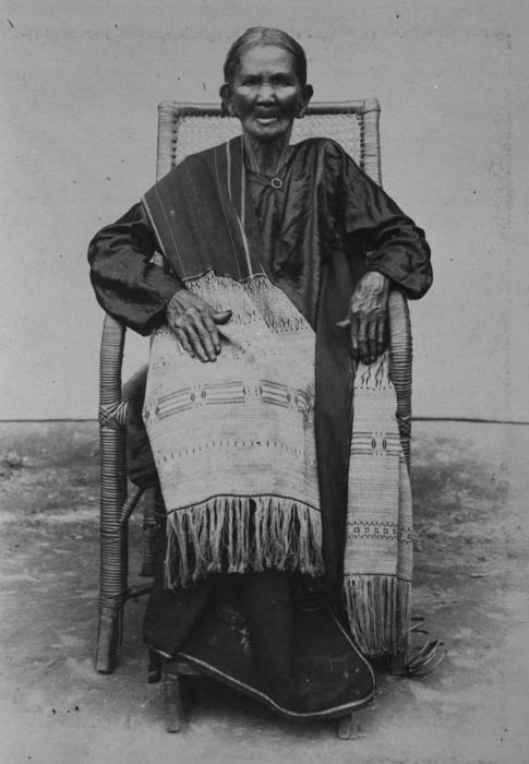 Foto. De vrouw van de lokale vorst, de Radja van der Nasia uit Taroetoeng, in traditionele kleding